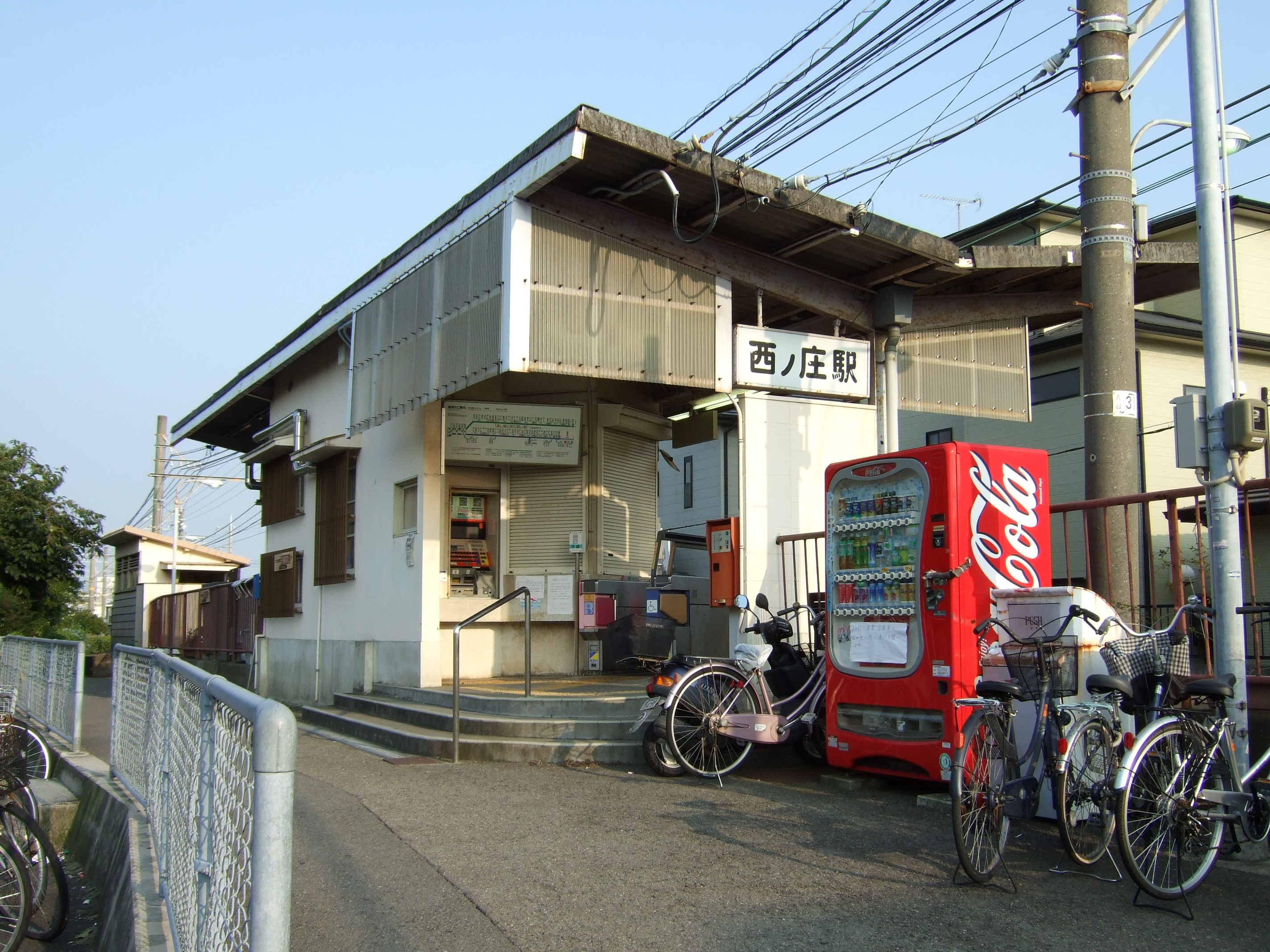 南海西ノ庄駅駅舎